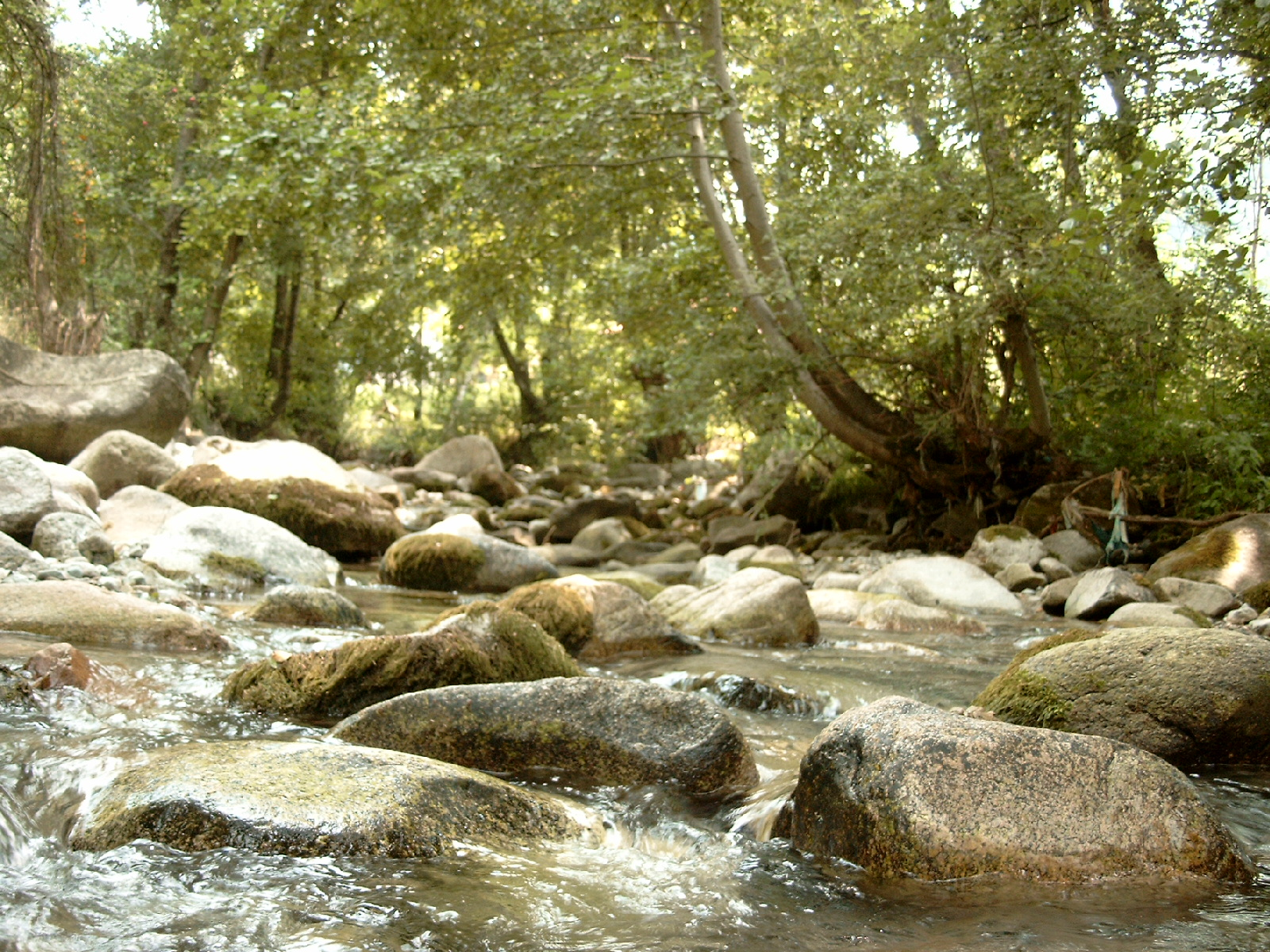 Река Соволянска Бистрица при Гурляно